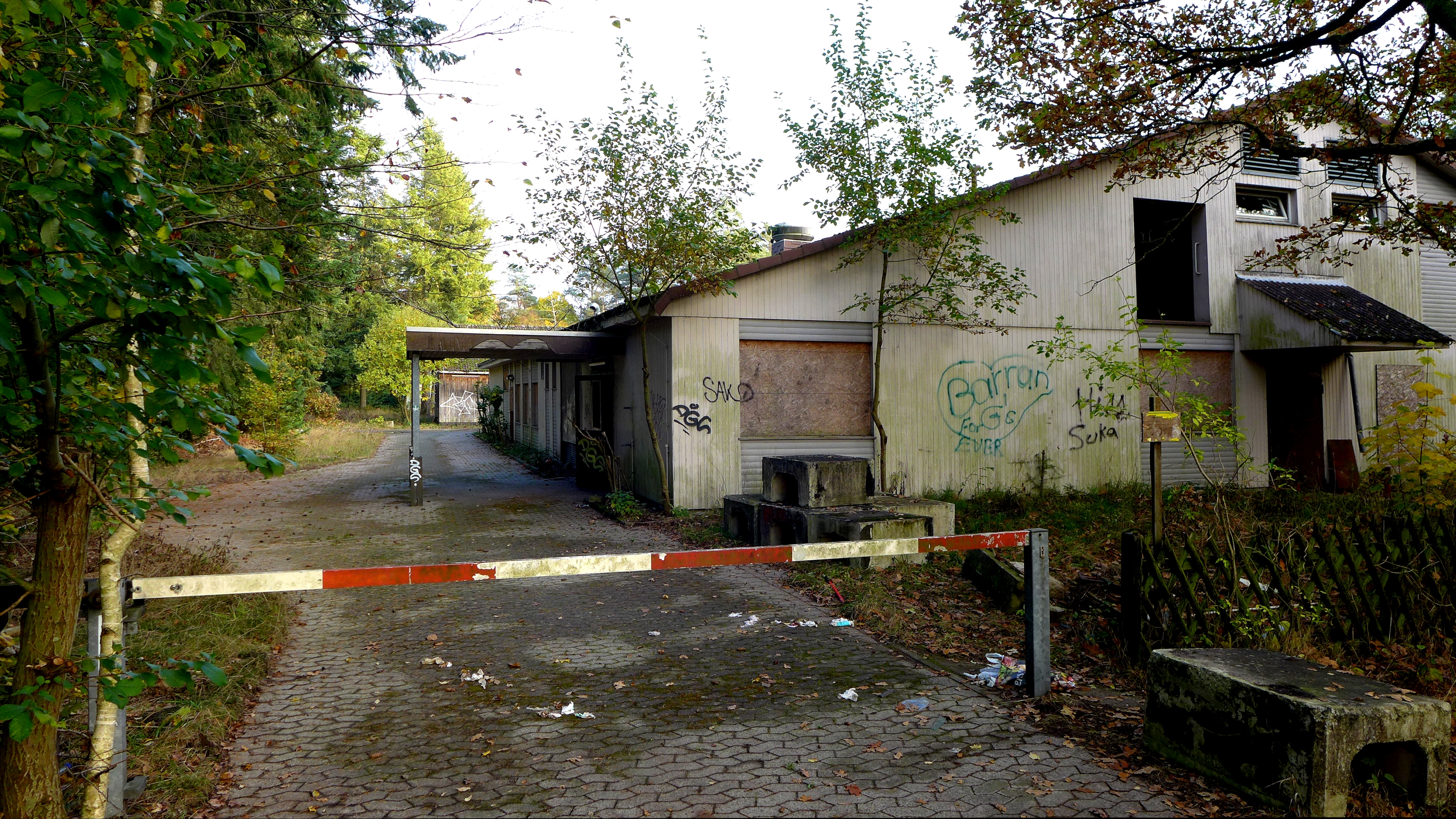 Ehemalige Endo-Klinik in Wintermoor. 1943 nahm die Stadt Hamburg diesen Klinik-Komplex für die Behandlung von Brandopfern und Kriegsverletzten im Zusammenhang mit dem 2. Weltkrieg als "Ausweich-Krankenhaus" in Betrieb. Ab 1947 wurden hier Tuberkulose-Kranke behandelt. Später wurde daraus eine Fachklinik für die Behandlung von Erkrankungen der Atmungsorgane. 1976 übernahm die Hamburger ENDO-Klinik als Spezialist für Knochen- und Gelenkchirurgie den Klinik-Komplex, mußte aber 1997 den Standort aus wirtschaftlichen Gründen schließen. Danach zog ein Seniorenpflegezentrum in die Anlage ein, ging allerdings 2005 in die Insolvenz. Spätere Versuche der Einrichtung eines Schulungs- oder Erlebniszentrums blieben bereits im Planungsansatz stecken.